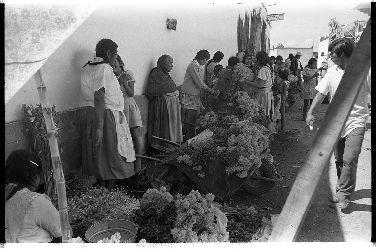 Fotografía antigua de la Ciudad de México resguardadas por el Museo Archivo de la Fotografía (MAF) de la Ciudad de México.